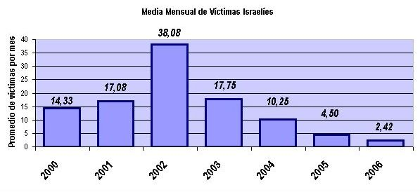 Media mensual de víctimas durante los años 2000 a 2006 donde se constata el descenso de las mismas a partir de 2003 Gráfico elaborado por mi a partir de los datos que ofrece la web [1] sobre las víctimas israelíes causadas por el terrorismo palestino desde el comienzo de la Intifada de al-Aqsa en septiembre de 2000 hasta finales de 2006.